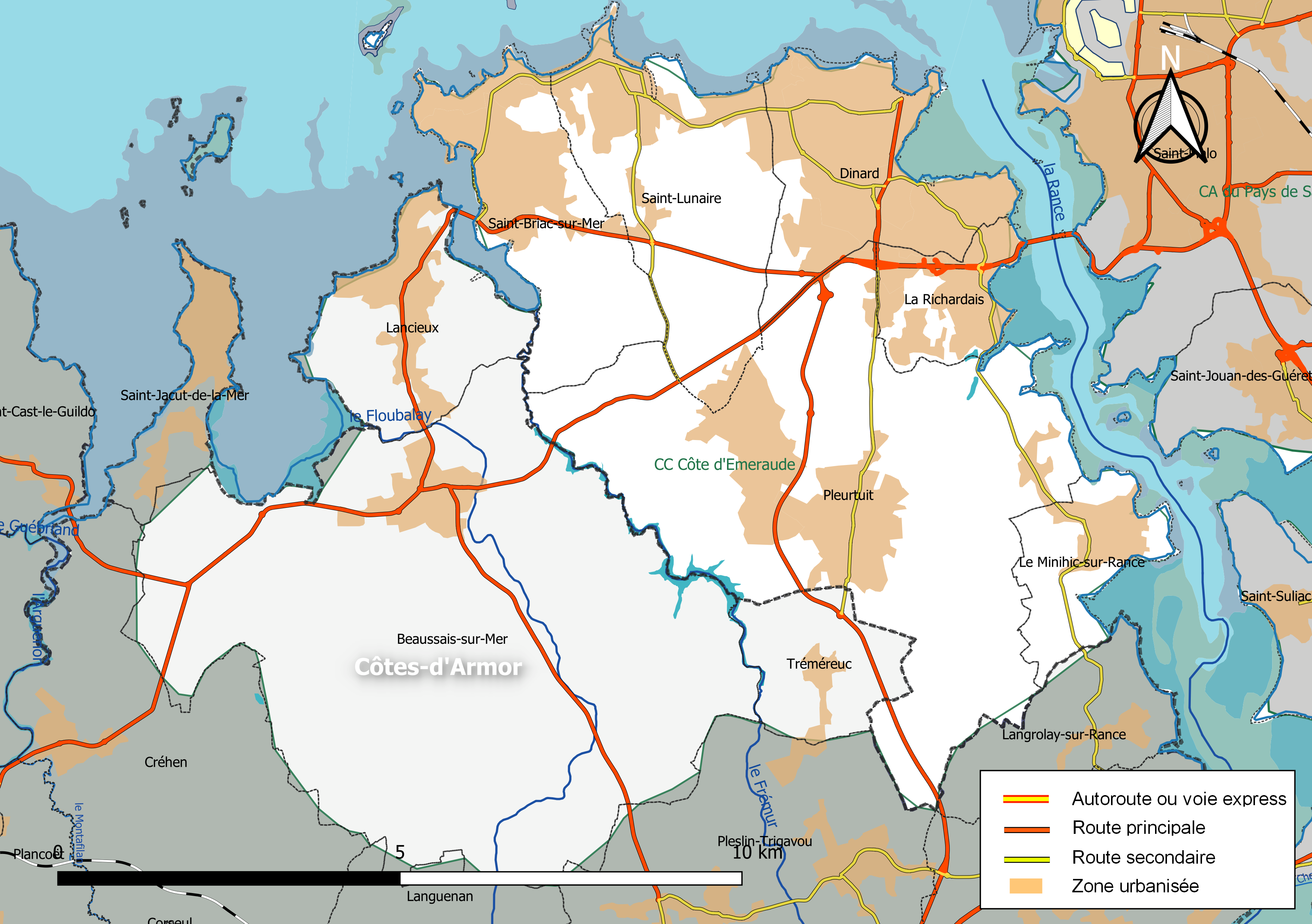 Carte géographique de la Communauté de communes Côte d'Émeraude, département d'Ille-et-Vilaine, France. Composition au 1er janvier 2019.